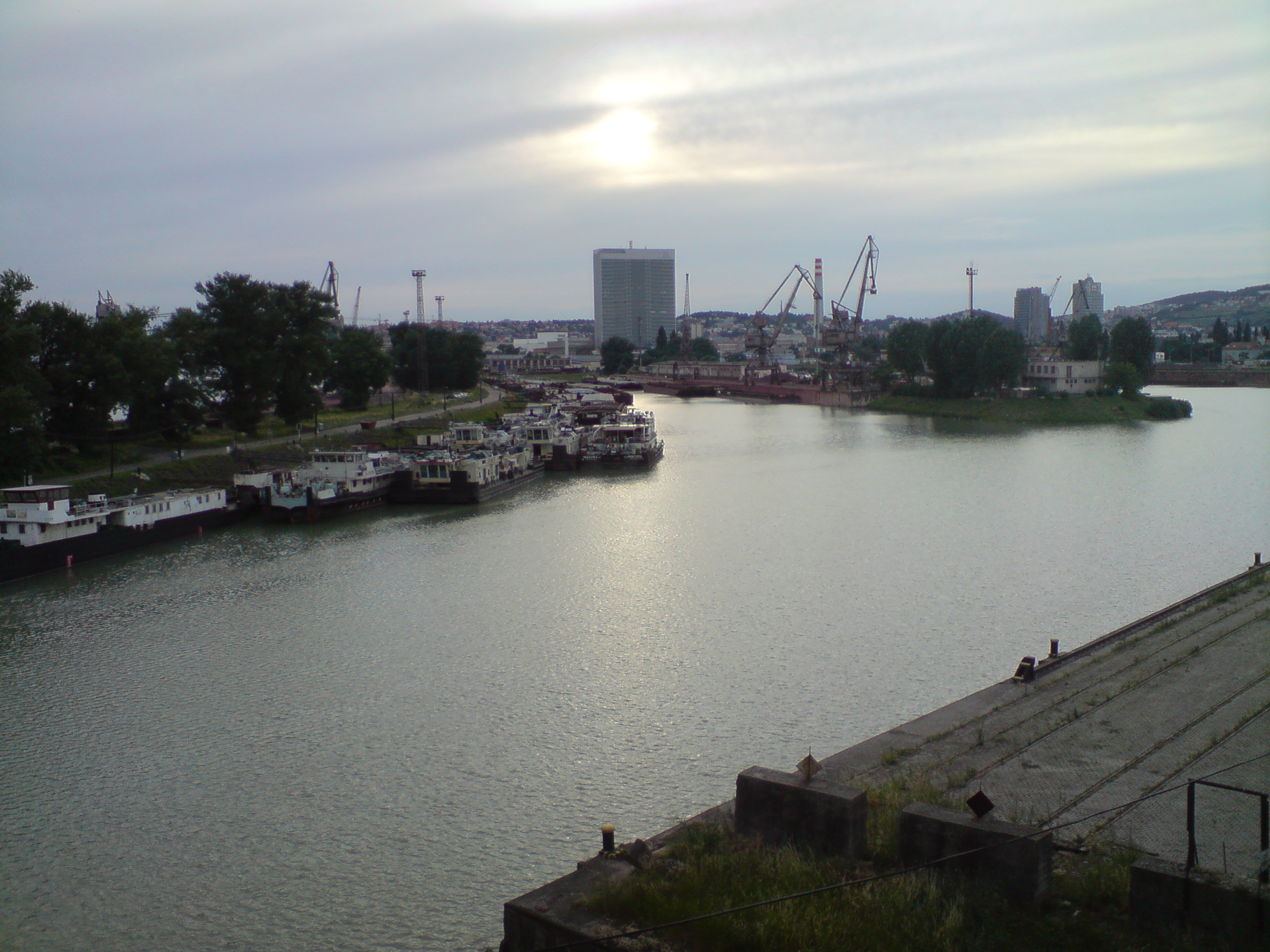 Zimný prístav, Ružinov, Bratislava II